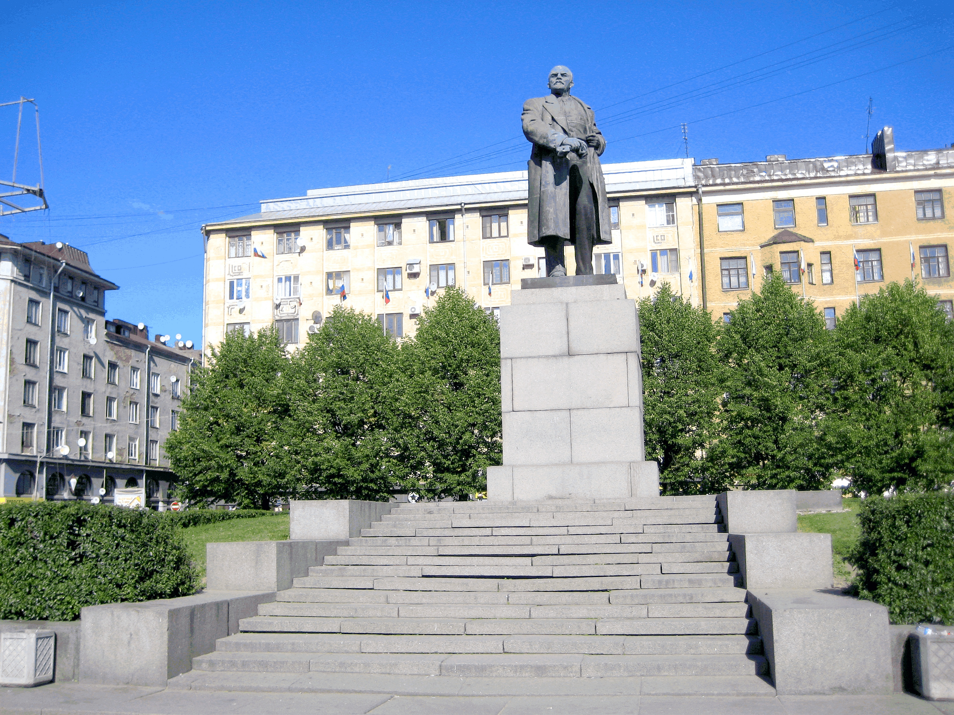 Памятник Ленину В.И.: площадь Красная, Выборг, Выборгский район, Ленинградская область